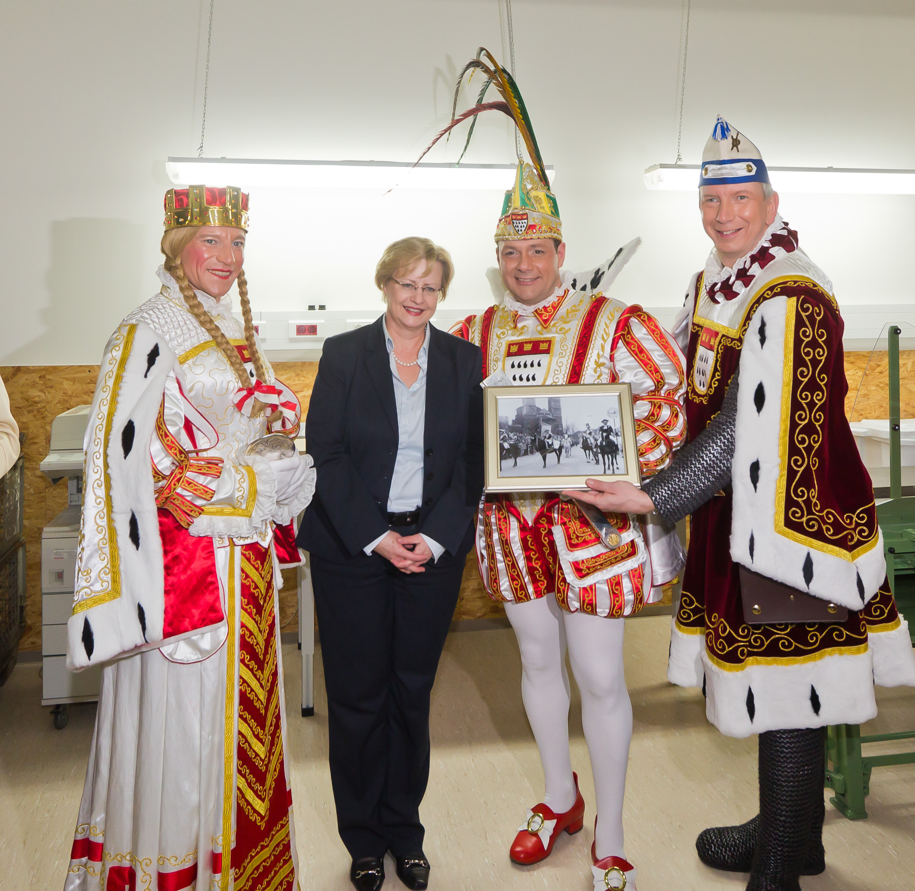 Besuch des Kölner Dreigestirns im Restaurierungs- und Digitalisierungzentrums (RDZ) des Historischen Archivs der Stadt Köln